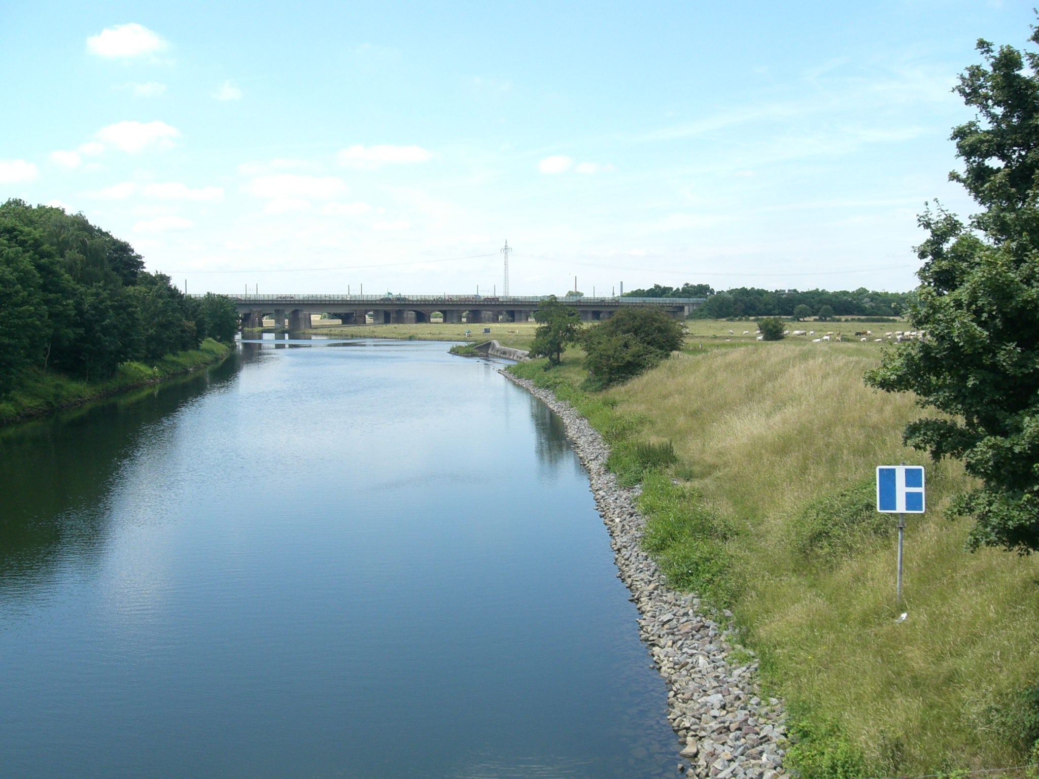 Ruhrschifffahrtskanal